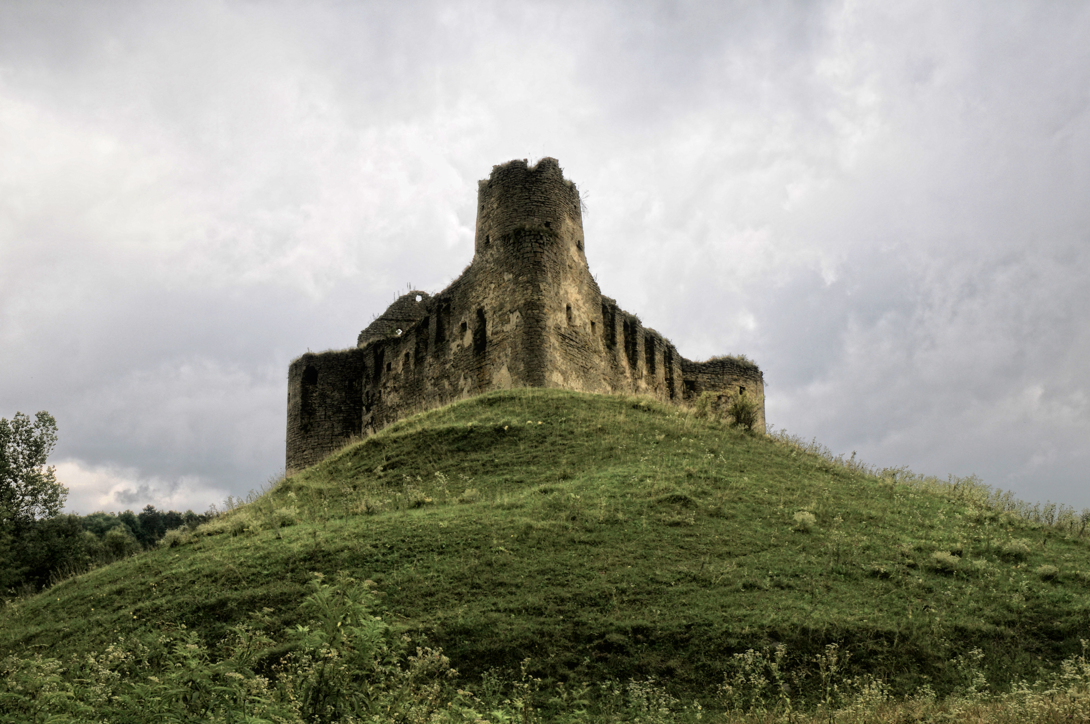 Сидорів, замок